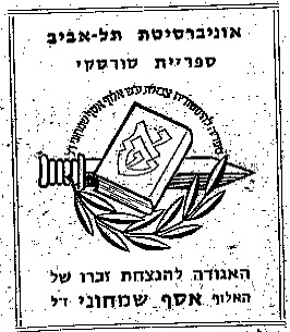 סמליל האגודה להנצחת אלוף אסף שמחוני